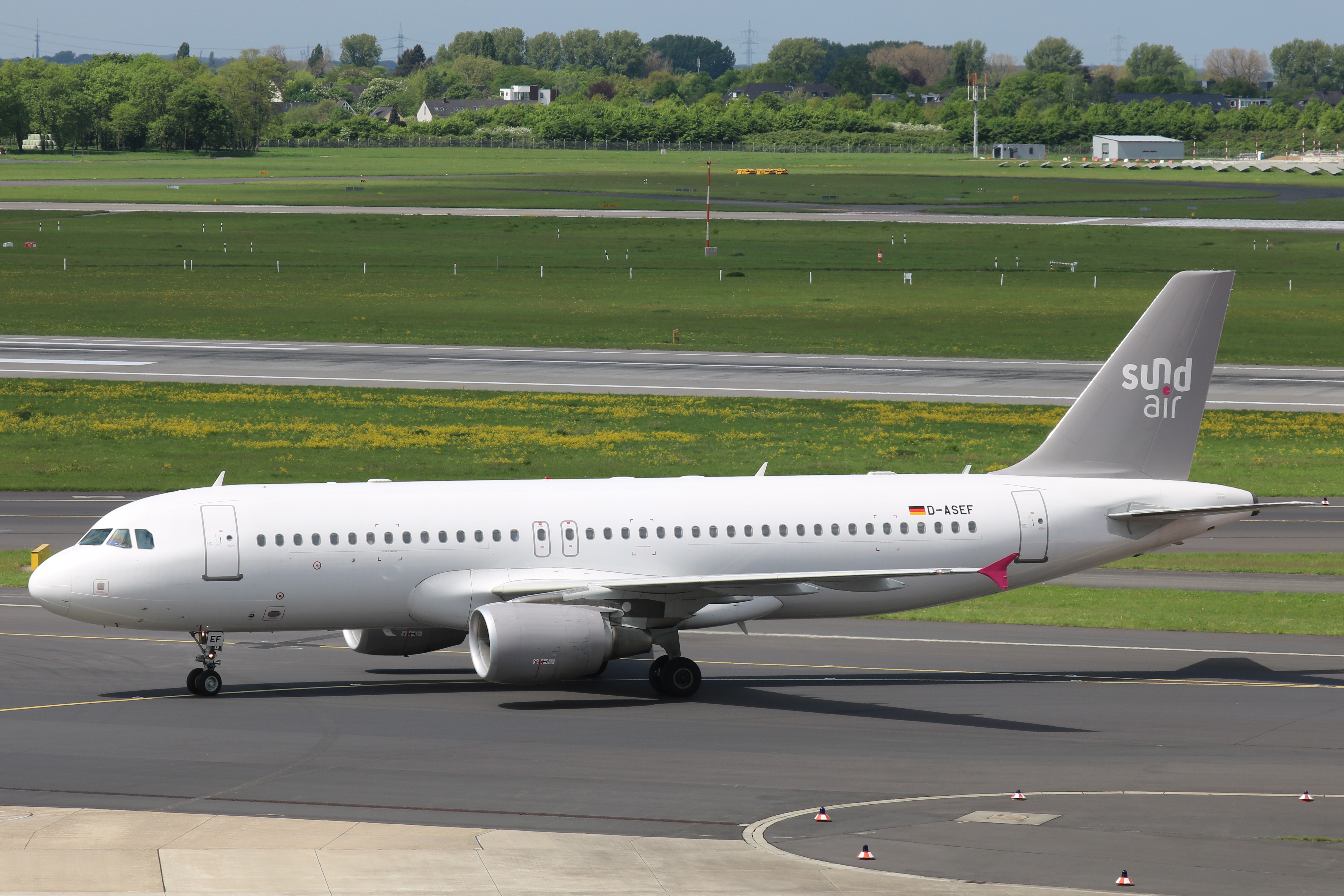 Flughafen Düsseldorf, Airbus A320-200 (D-ASEF) der Sundair